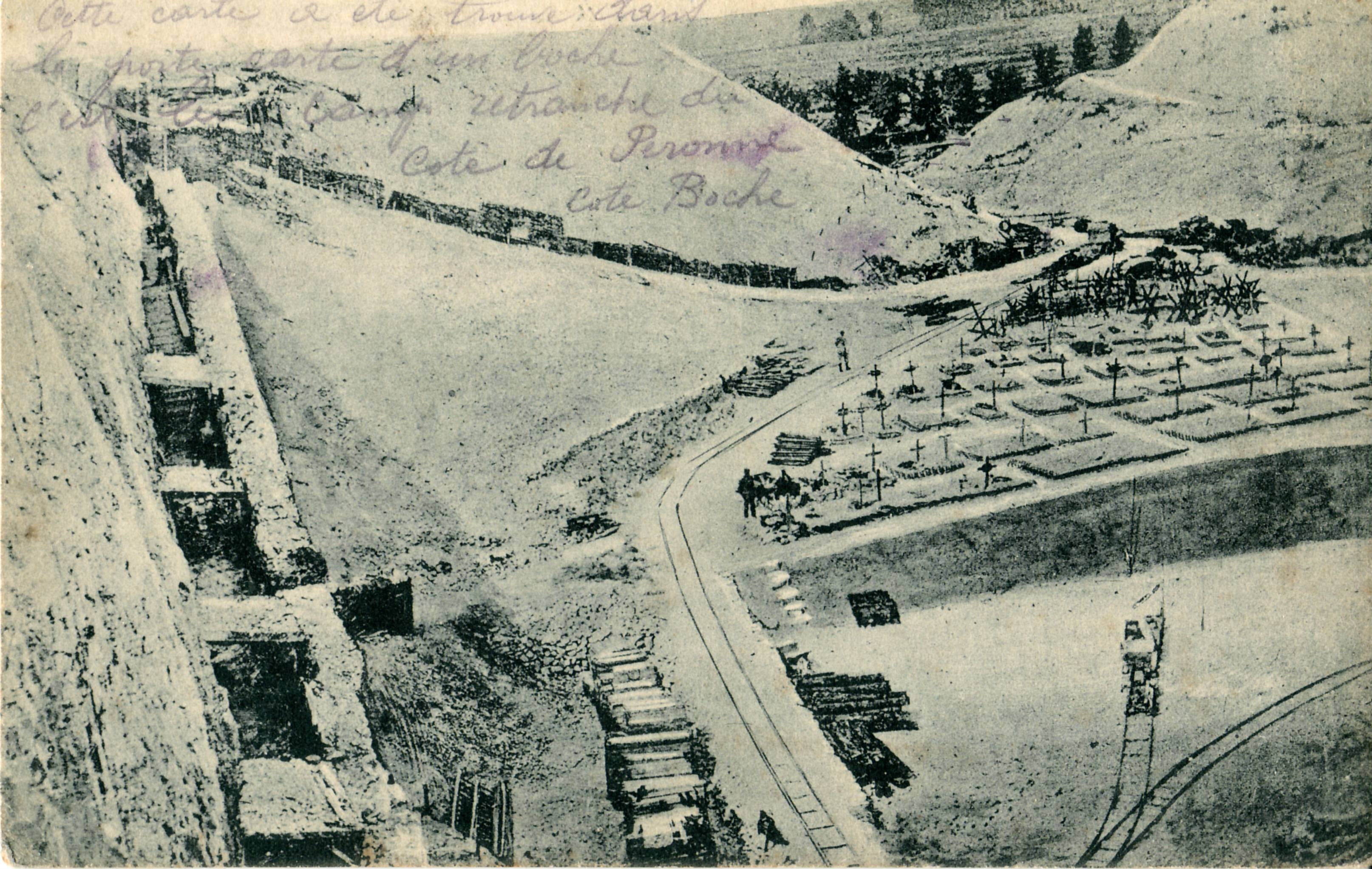 Carte photo légendée par l'expéditeur au recto : Cette carte a été trouvée dans le porte carte d'un boche. C'est leur camp retranché du coté de Péronne - Coté Boche